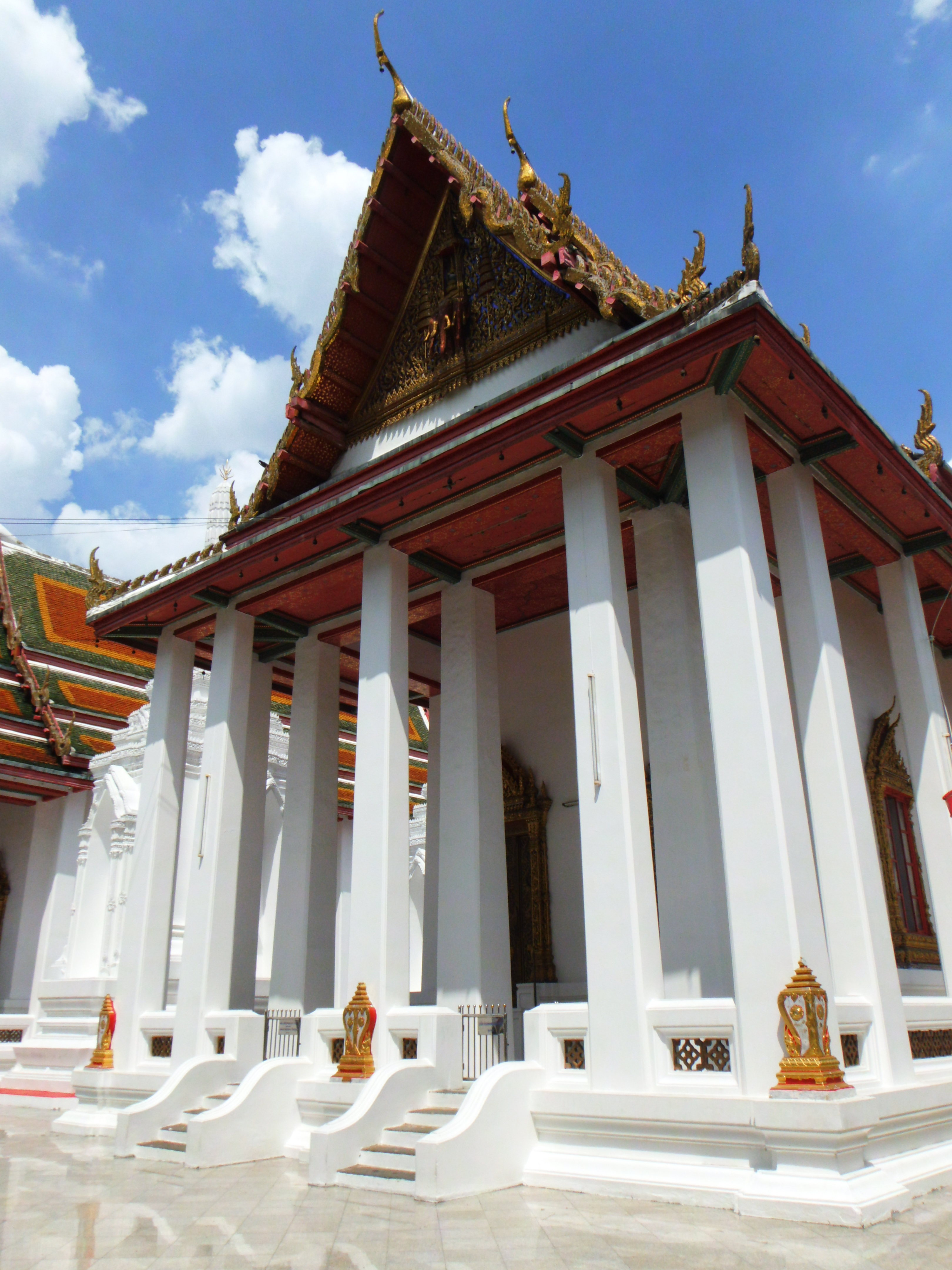 วัดมหาพฤฒาราม